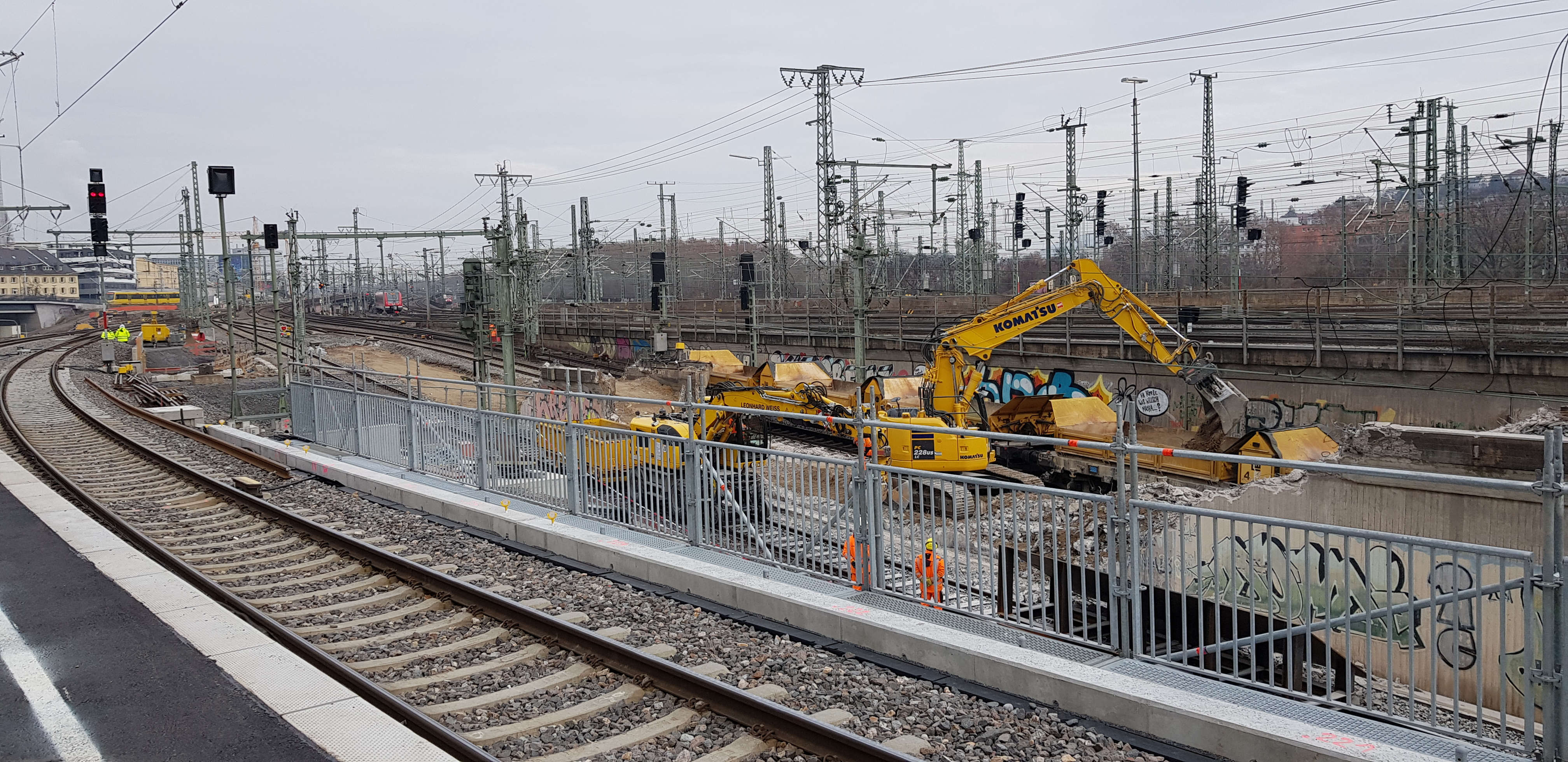 Rückbau des "Pilzgleises" am Stuttgarter Hauptbahnhof im Zuge von Bauarbeiten zum Projekt Stuttgart 21.